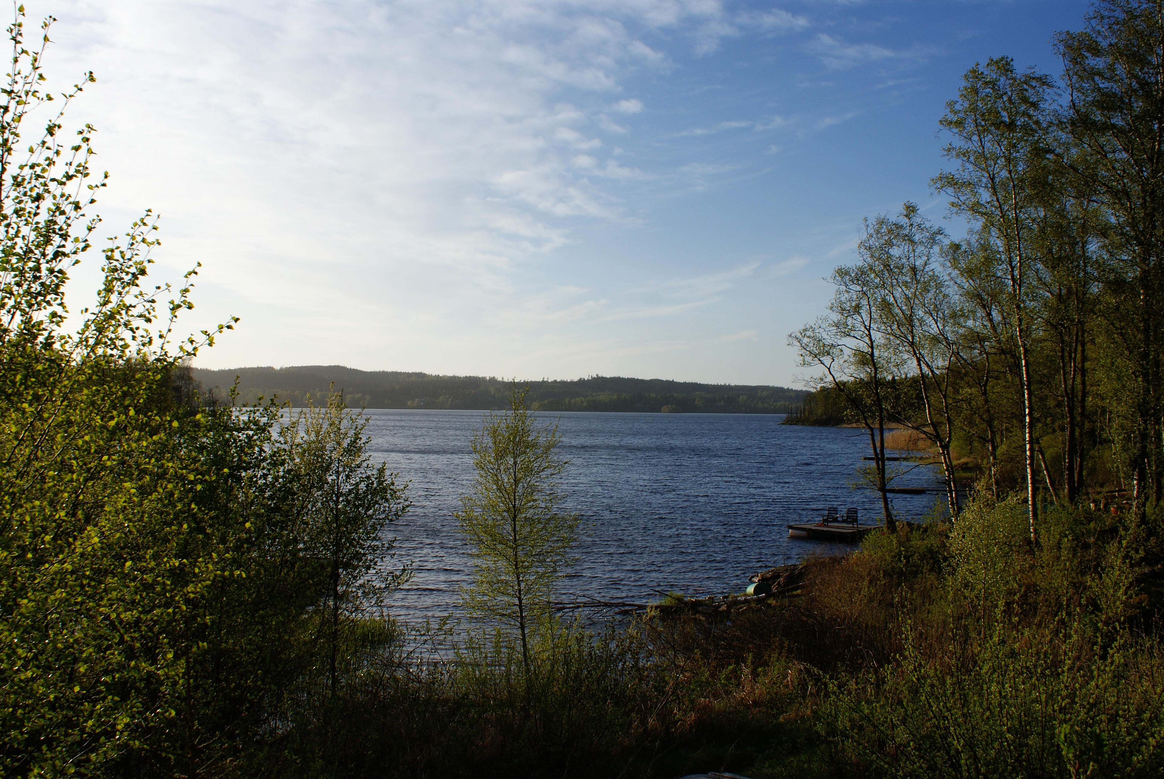 Västra Nedsjön fotograferad från Ingelse.